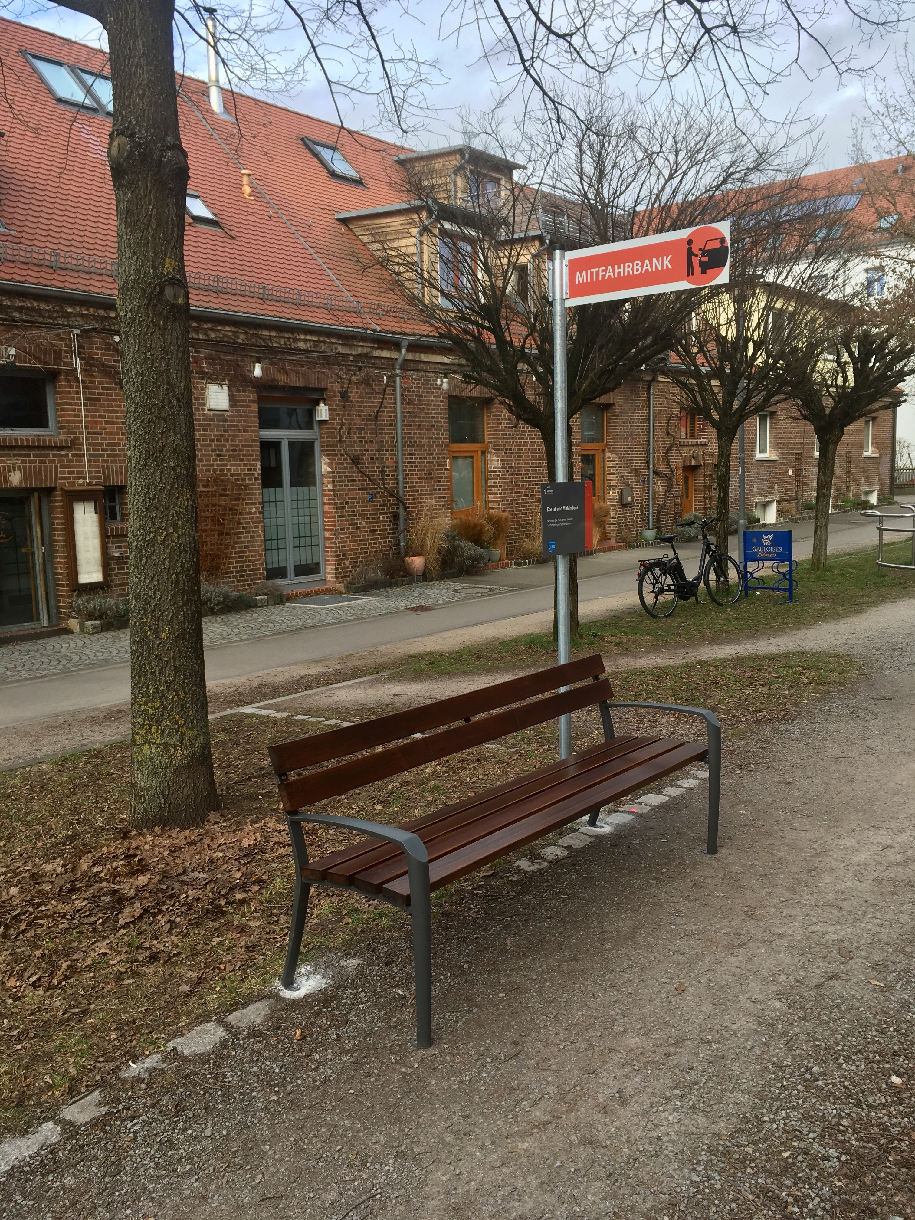 Mitahrerbank in der Aixer Straße in Tübingen